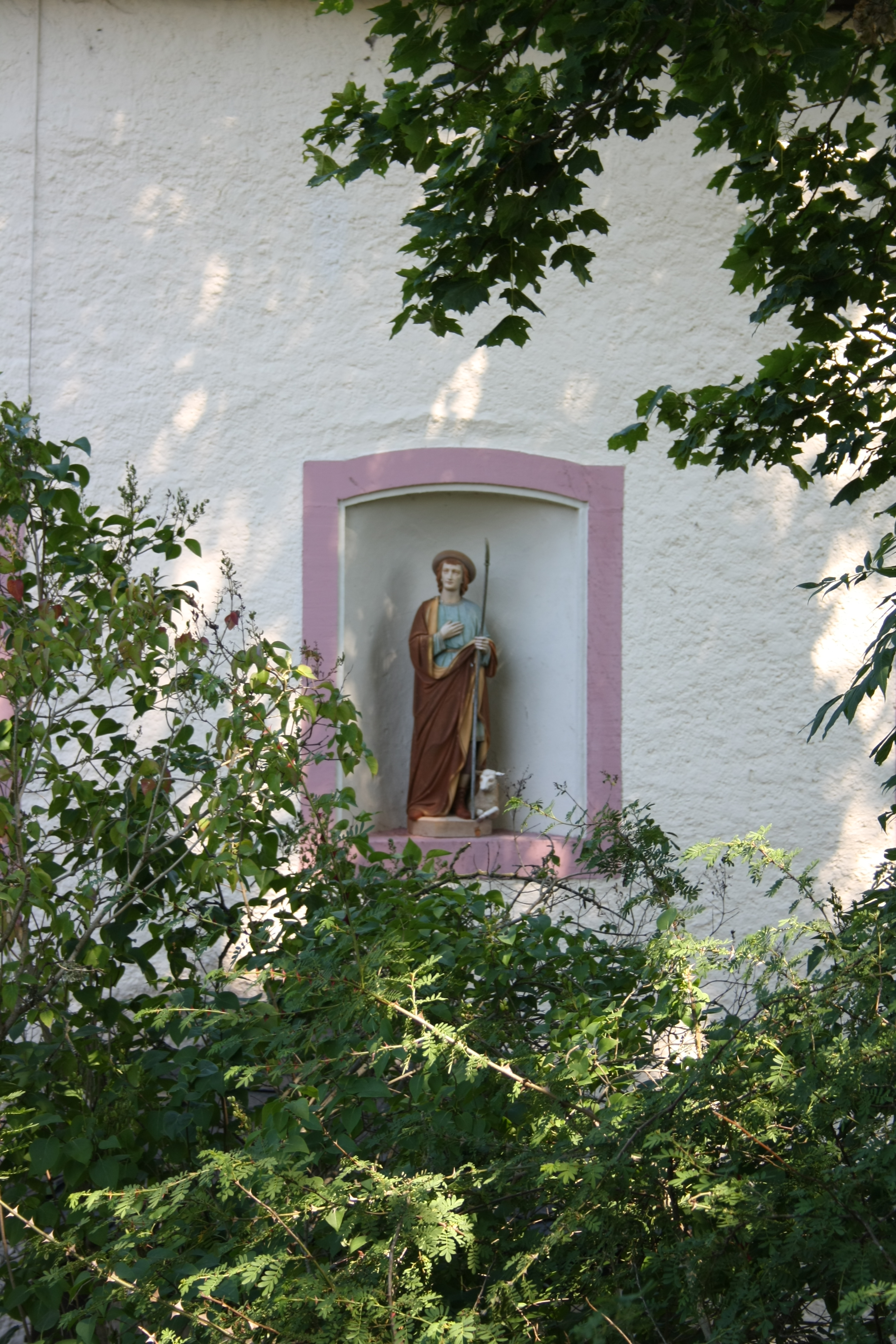 Statue des hl. Wendelinus im ehemaligen Pfarrhaus von Kirmutscheid